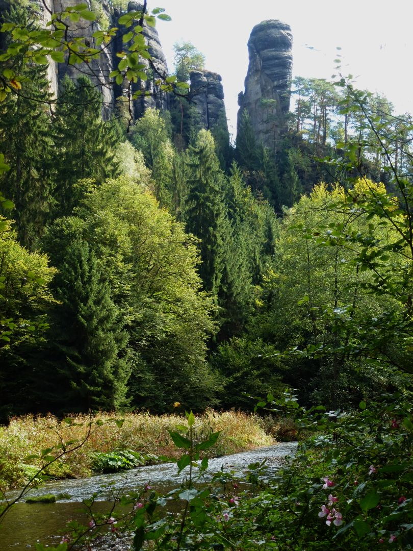 Polenztalwächter